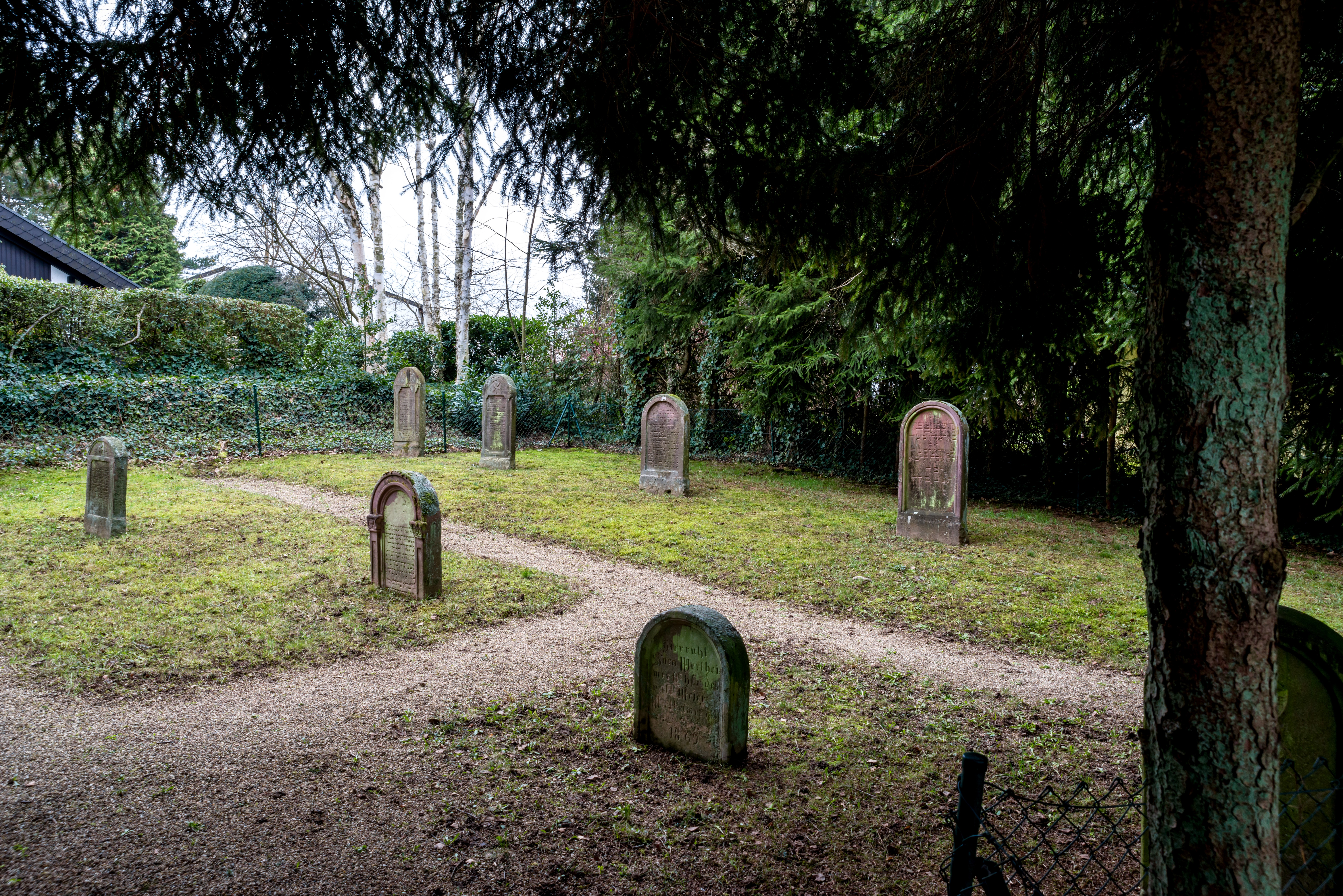 Bilder von der Tour Achern Offenburg am 10.02.2018